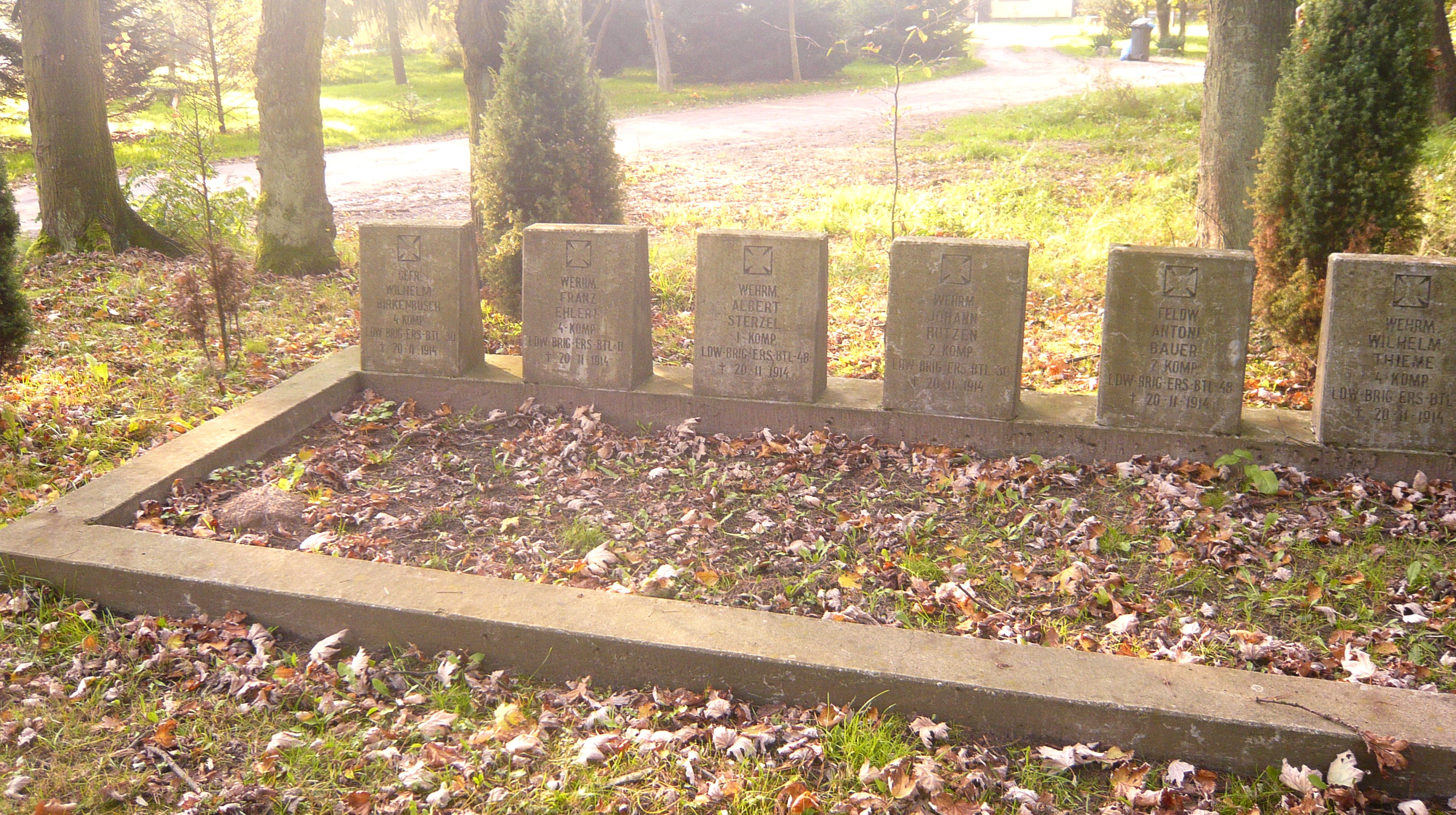 Cmentarz wojenny w Stawiszcze